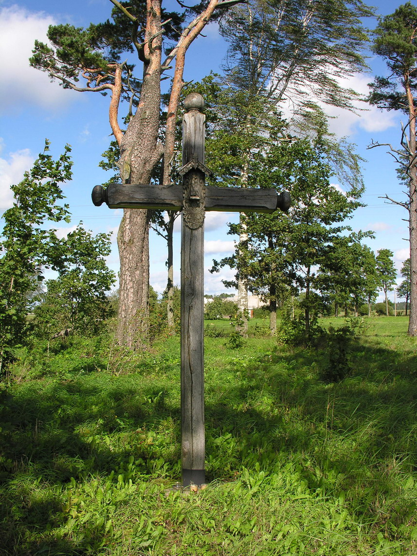 Senmiestė Mažeikių raj., Židikų seniūnija Senmiestės kaimo kapinaitės Foto: Algirdas, 2006 m. rugsėjo 9 d., Lietuva